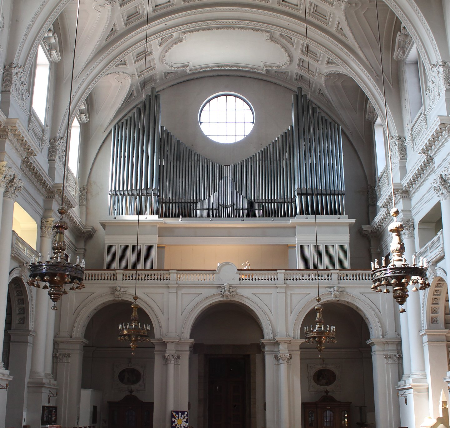 Orgel von St. Margaret in München (A. Schwenk, 1955, III/56)